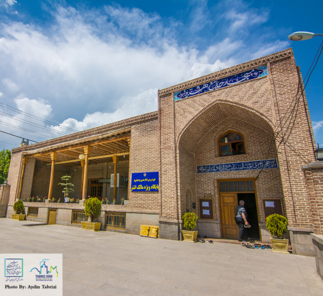 مسجد جامع هشترود